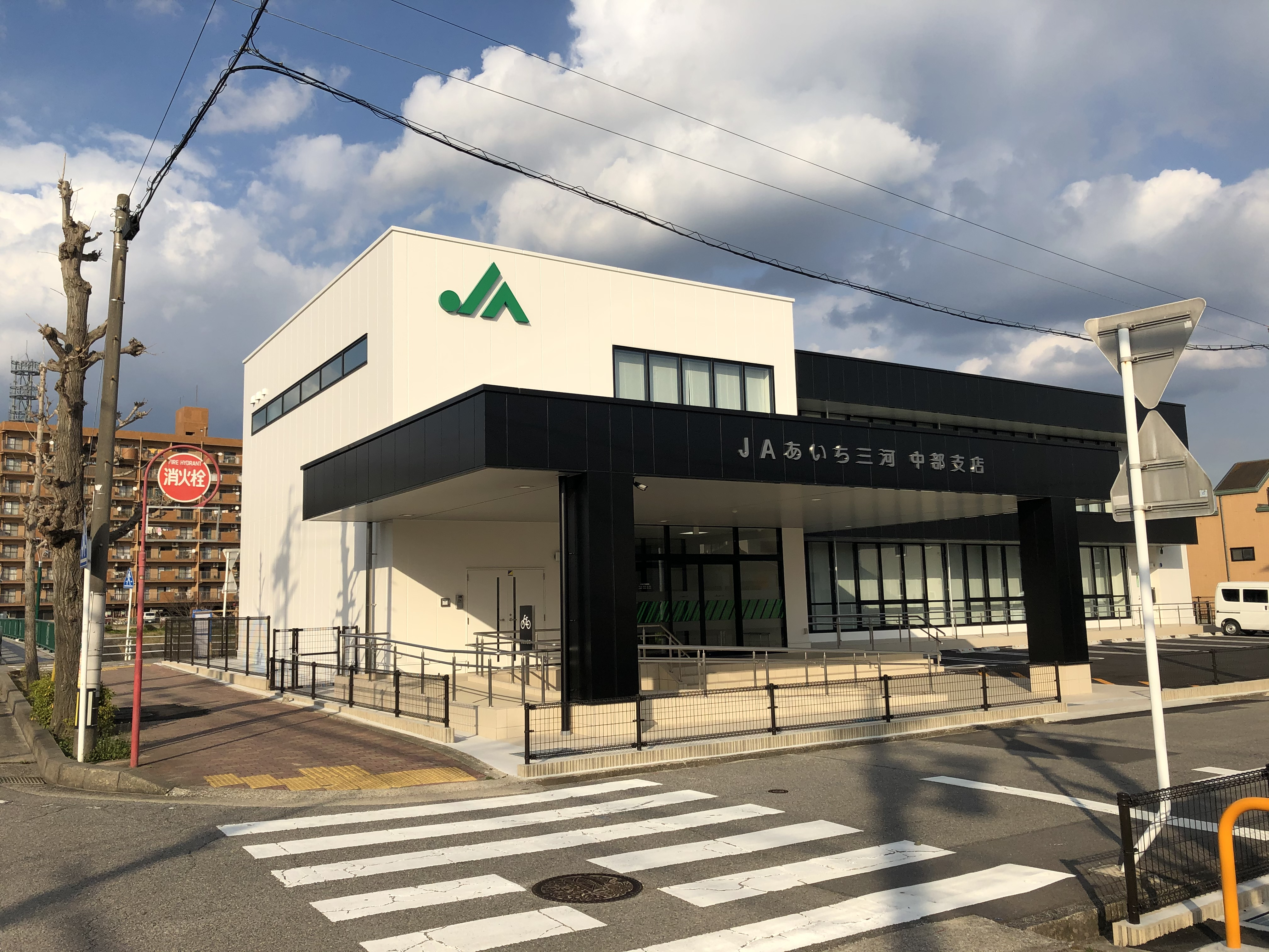 JAあいち三河中部支店。2020年1月27日、岡崎市明大寺町字天白前に移転した。